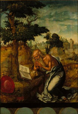 "São Jerónimo" forma, juntamente com a "Pregação de São João Baptista", "Santo Antão e São Paulo Eremita", "Santo Antão e o Sátiro" e "Visão de Santo Antão", um conjunto designado por "série dos arcos" devido à arcaria que se rasga sobre um fundo azul e que corre a parte inferior de todas as tábuas. O "Retábulo do Mestre dos Arcos", nome pelo qual também é conhecido, não foi ainda objecto de um estudo aprofundado, com a excepção de Luís Reis-Santos que atribuíu a autoria dos quadros a Gregório Lopes, o que, contudo, não deixa de levantar alguns problemas, uma vez que estas pinturas não se enquadram plenamente no estilo do pintor. Este quadro, tal como os restantes quatro painéis que compunham o conjunto da "série dos arcos", provêm do convento de São Bento da Saúde, embora tudo indique que não seriam originários desta instituição beneditina, uma vez que apenas foi construída em 1598, ou seja, numa data posterior à feitura dos quadros.